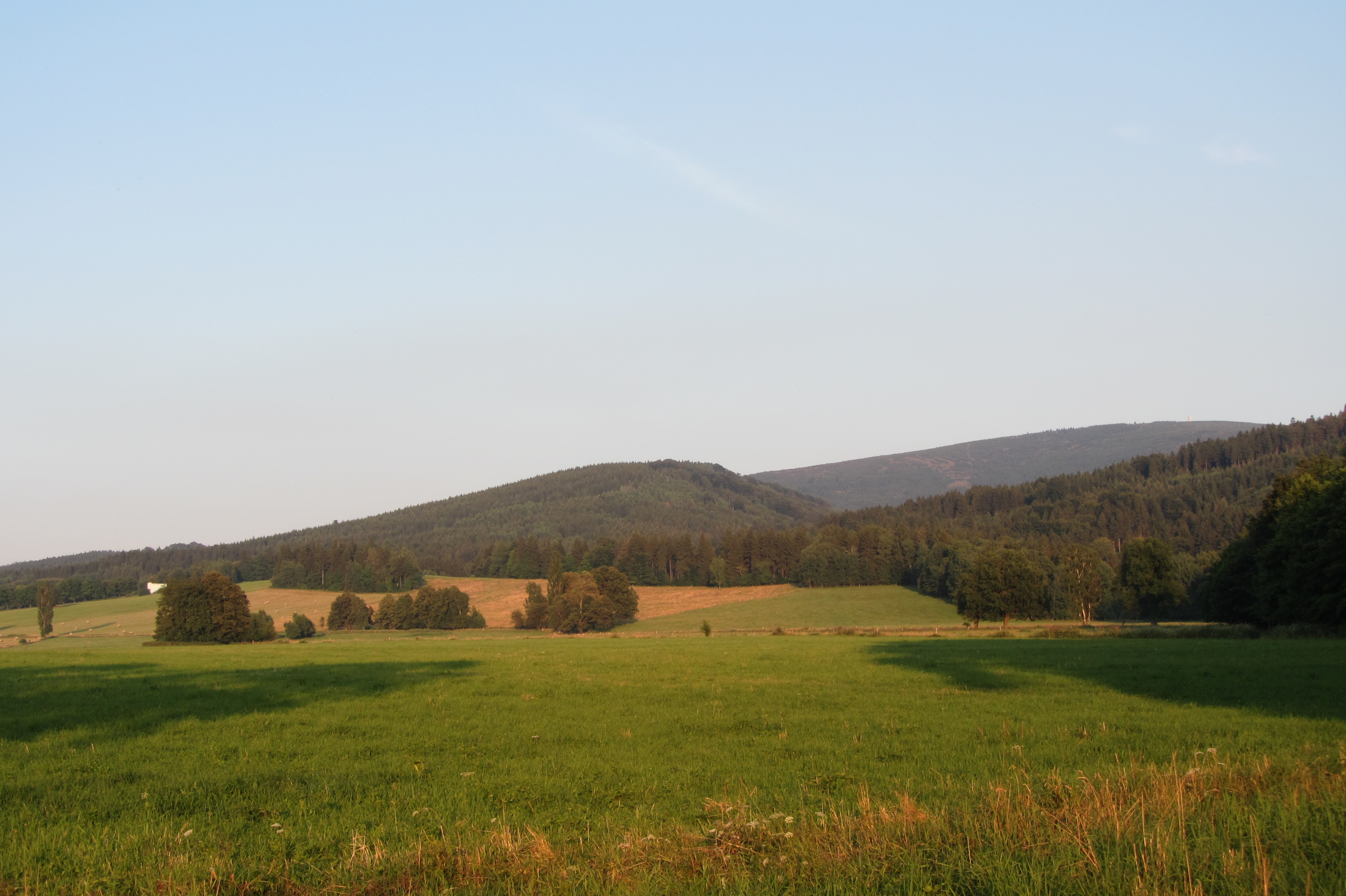 Vrch Měděnec (v pozadí jizerskohorský Smrk) při pohledu ze silnice mezi Ludvíkovem pod Smrkem a Novým Městem pod Smrkem.